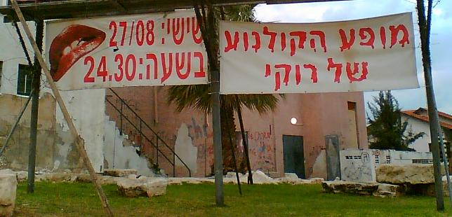 שלט מופע הקולנוע של רוקי בפתח קולנוע "כוכב" ברמת השרון. צילם דוד שי